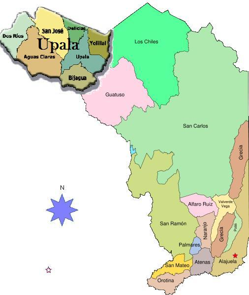 Ubicación de Upala y su división administrativa